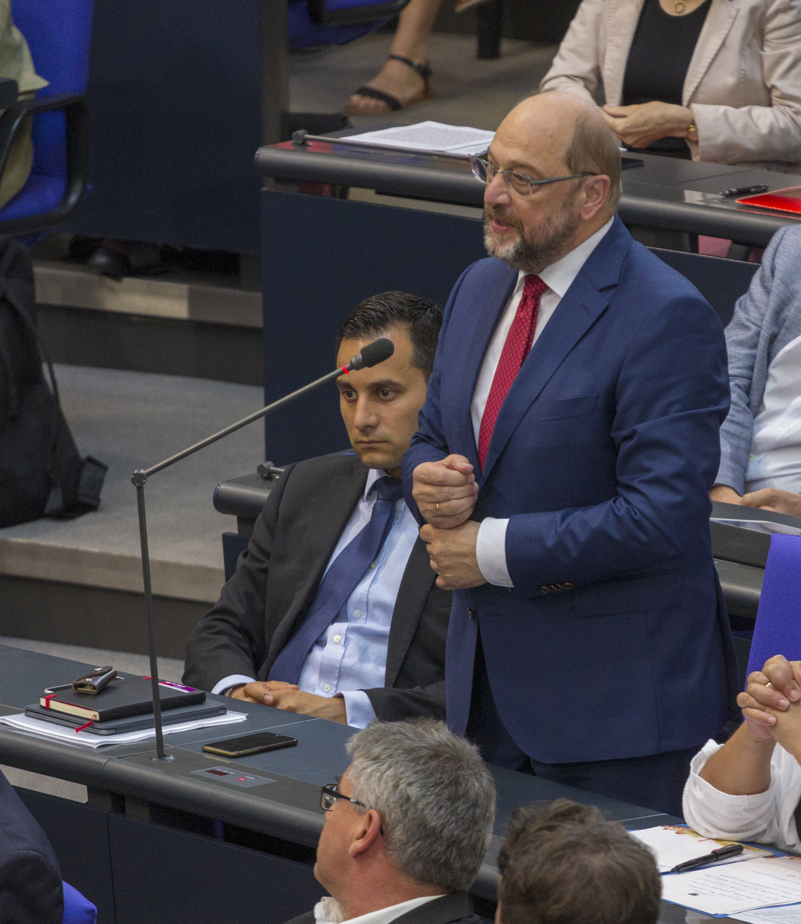 Martin Schulz während der Plenarsitzung des Deutschen Bundestages am 26. Juni 2019 in Berlin.